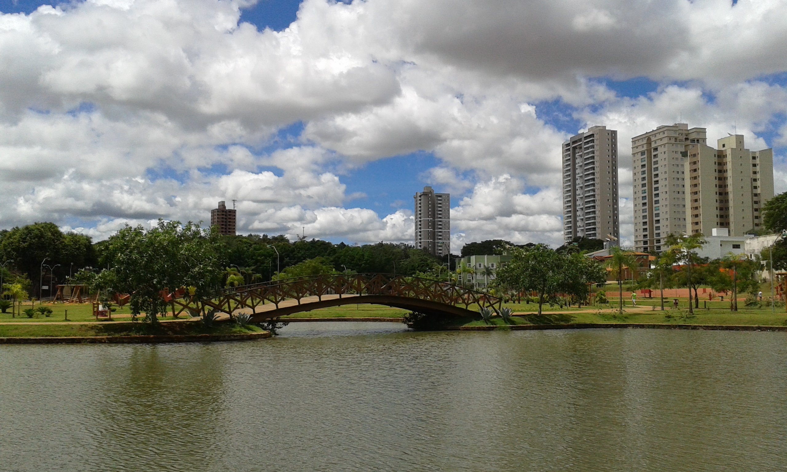 Jundiaí, Anápolis - GO, Brazil